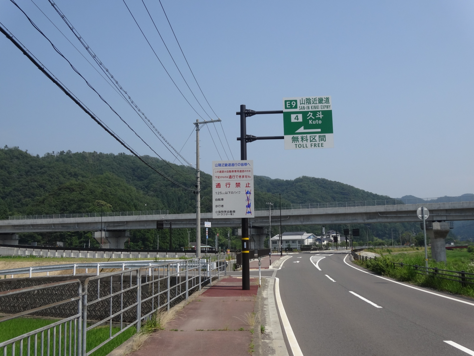 久斗インターチェンジ（インターチェンジ北側の兵庫県道257号より撮影）